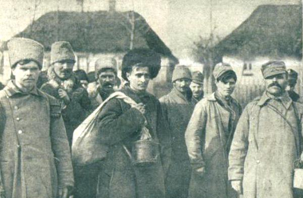 Avstro-ogrski vojaki po vrnitvi iz ruskega ujetništva.